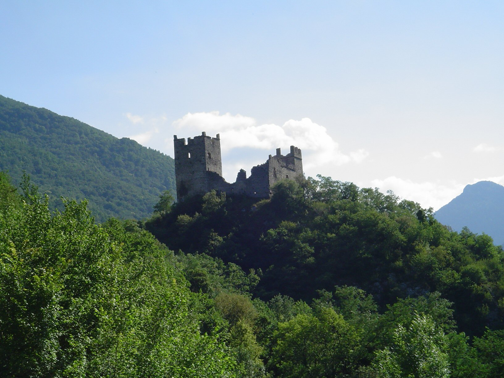 Château de Miglos (France,09)